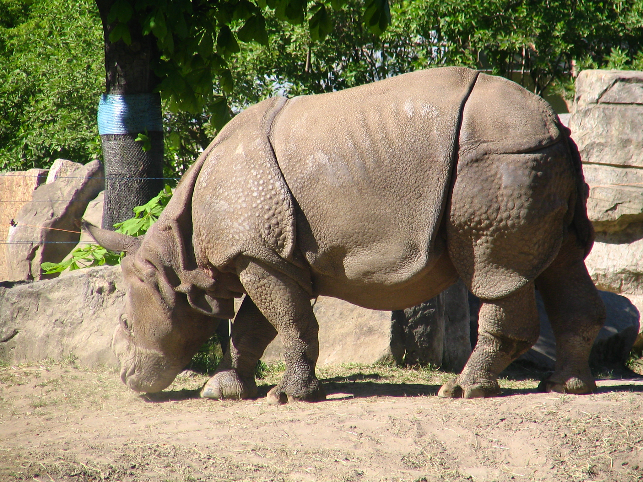 Warszawskie Zoo / Nosorożec